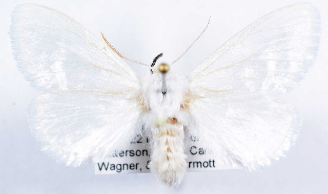 Norape virgo